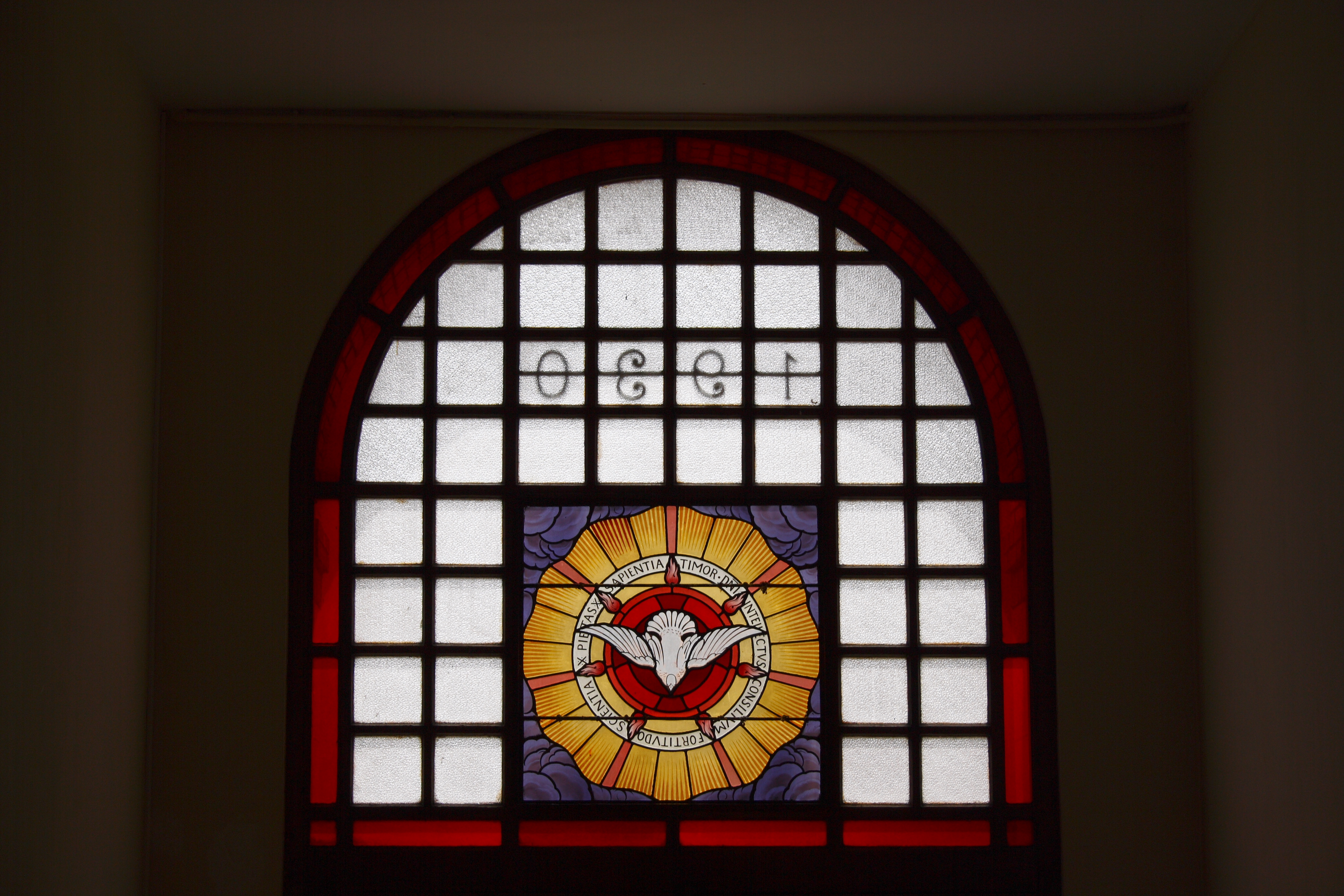 Bleiglasfenster im Séminaire des Missions in Chevilly-Larue im Département Val-de-Marne in der Île-de-France